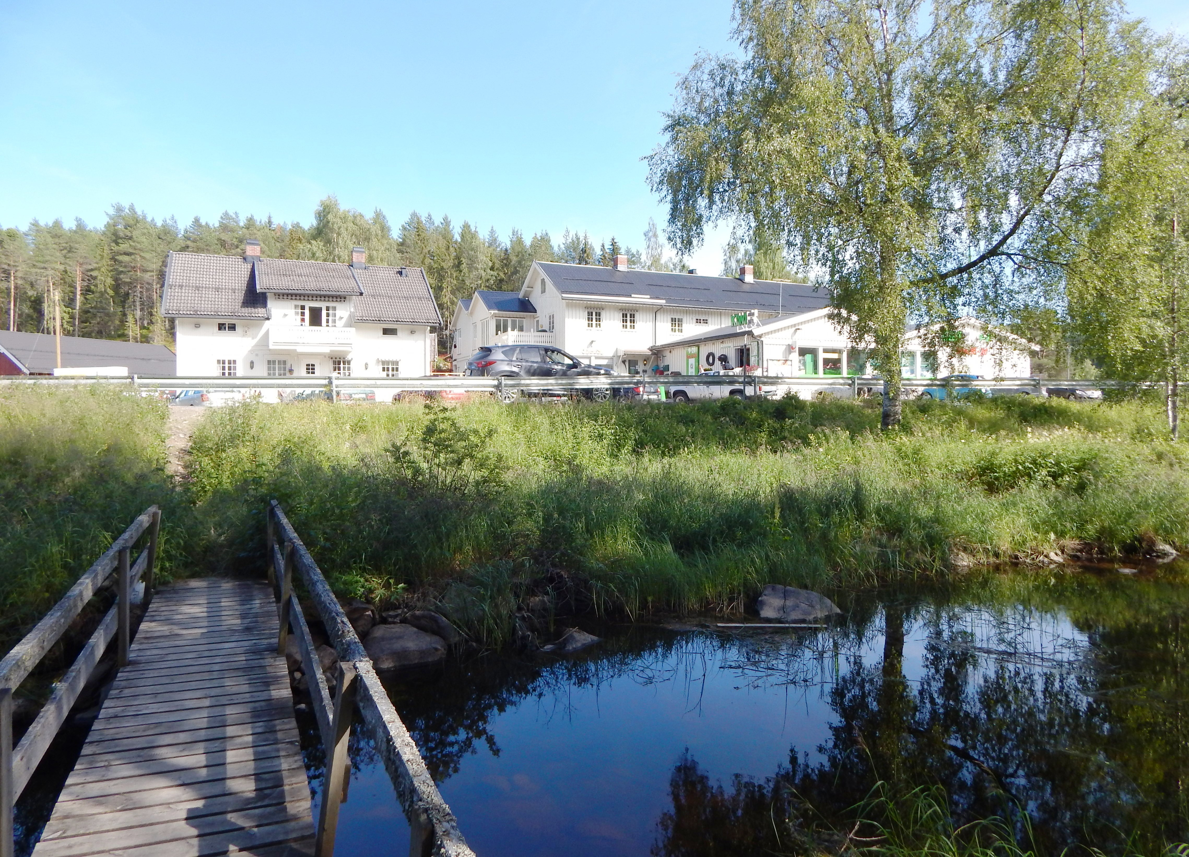 Næroset